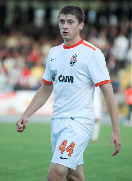 Ярослав Владимирович Ракицкий — украинский футболист.